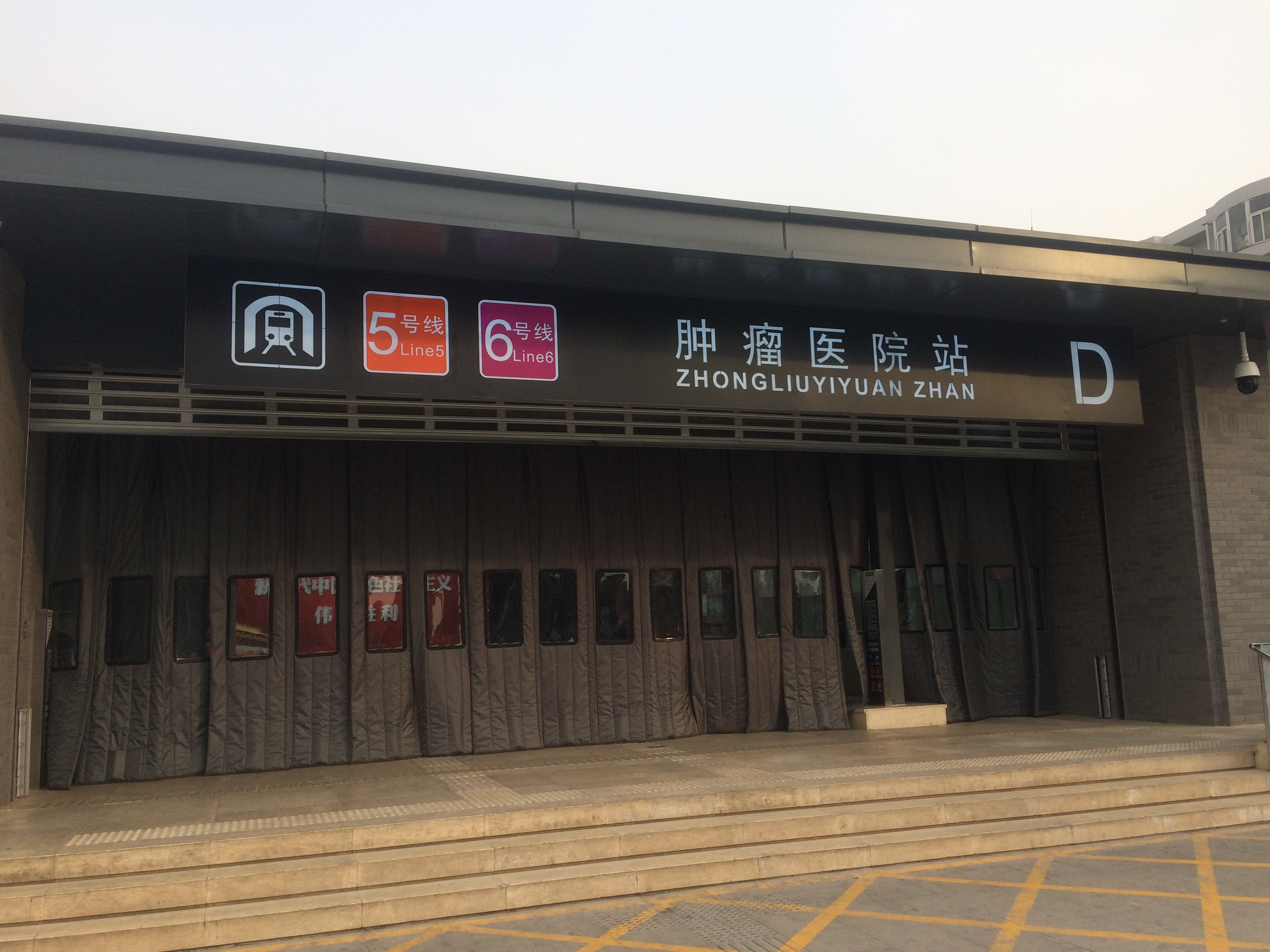 天津地铁肿瘤医院站D出口